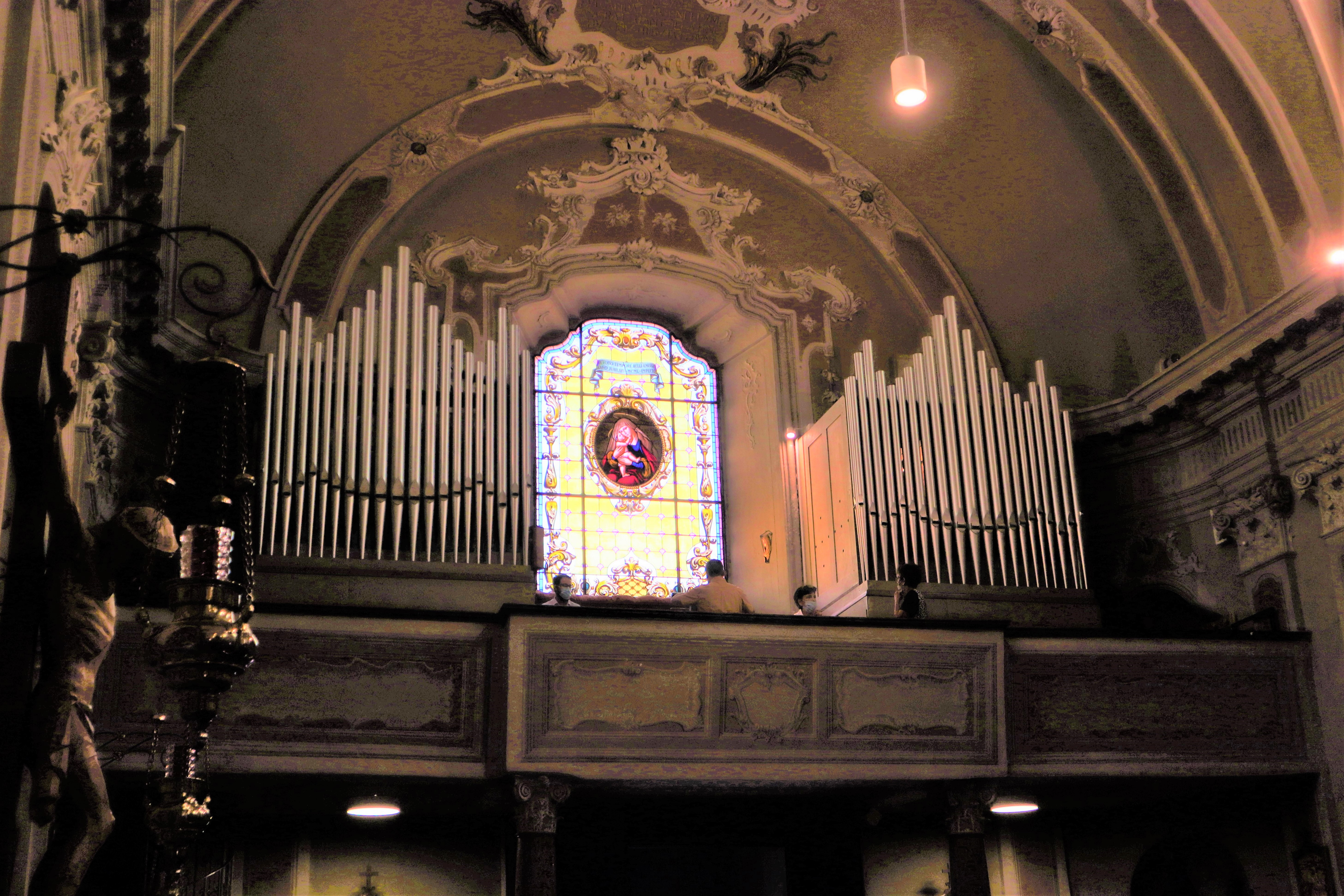 Chiesa parrocchiale della Purificazione di Maria di Volano in Trentino. Interno con Organo in controfacciata.